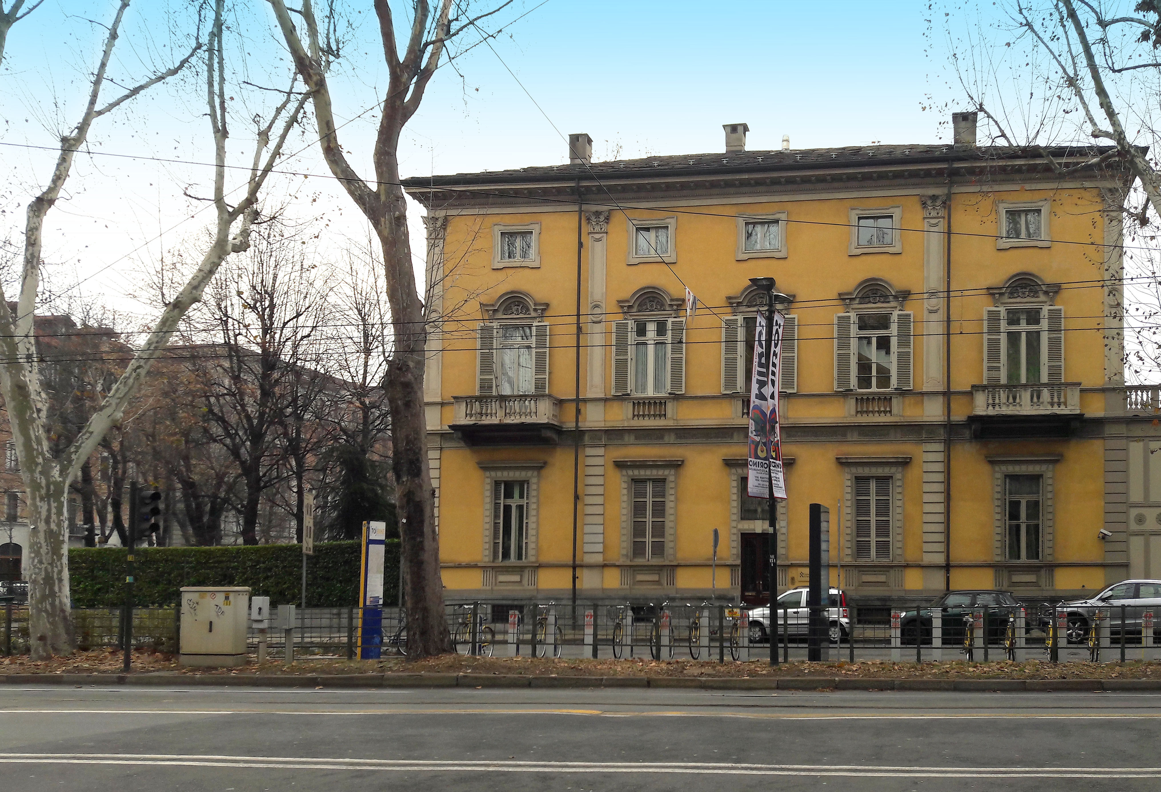 Sede della Compagnia di San Paolo a Torino (immagine scattata personalmente il 10 gennaio 2018)